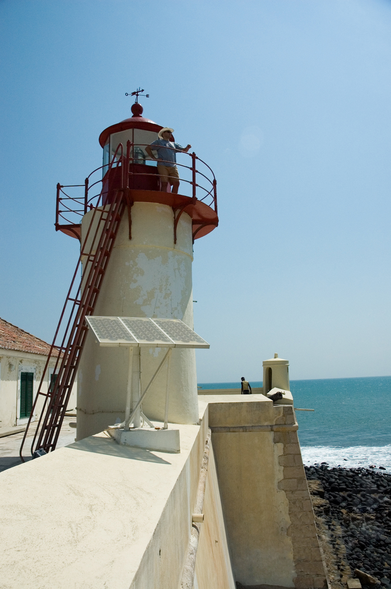 Fort São Sebastião, light house, São Tomé, São Tomé and Príncipe